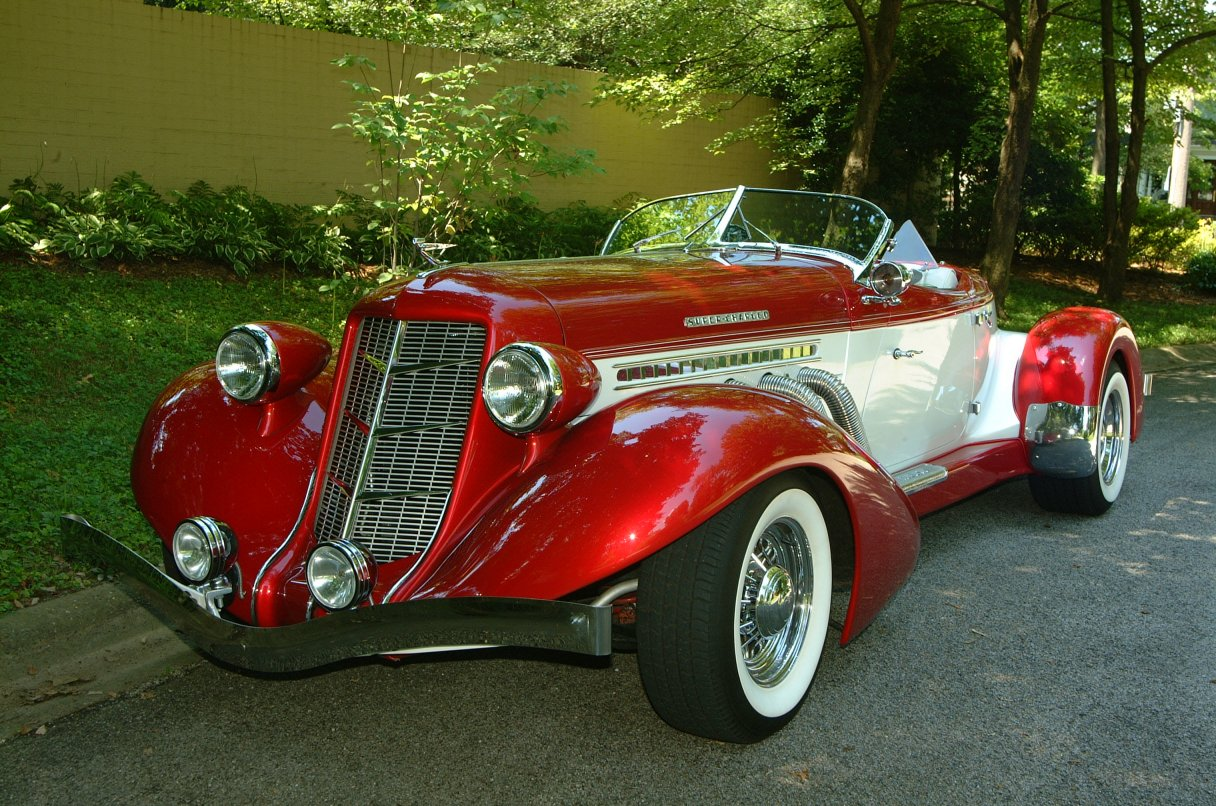 slika auta